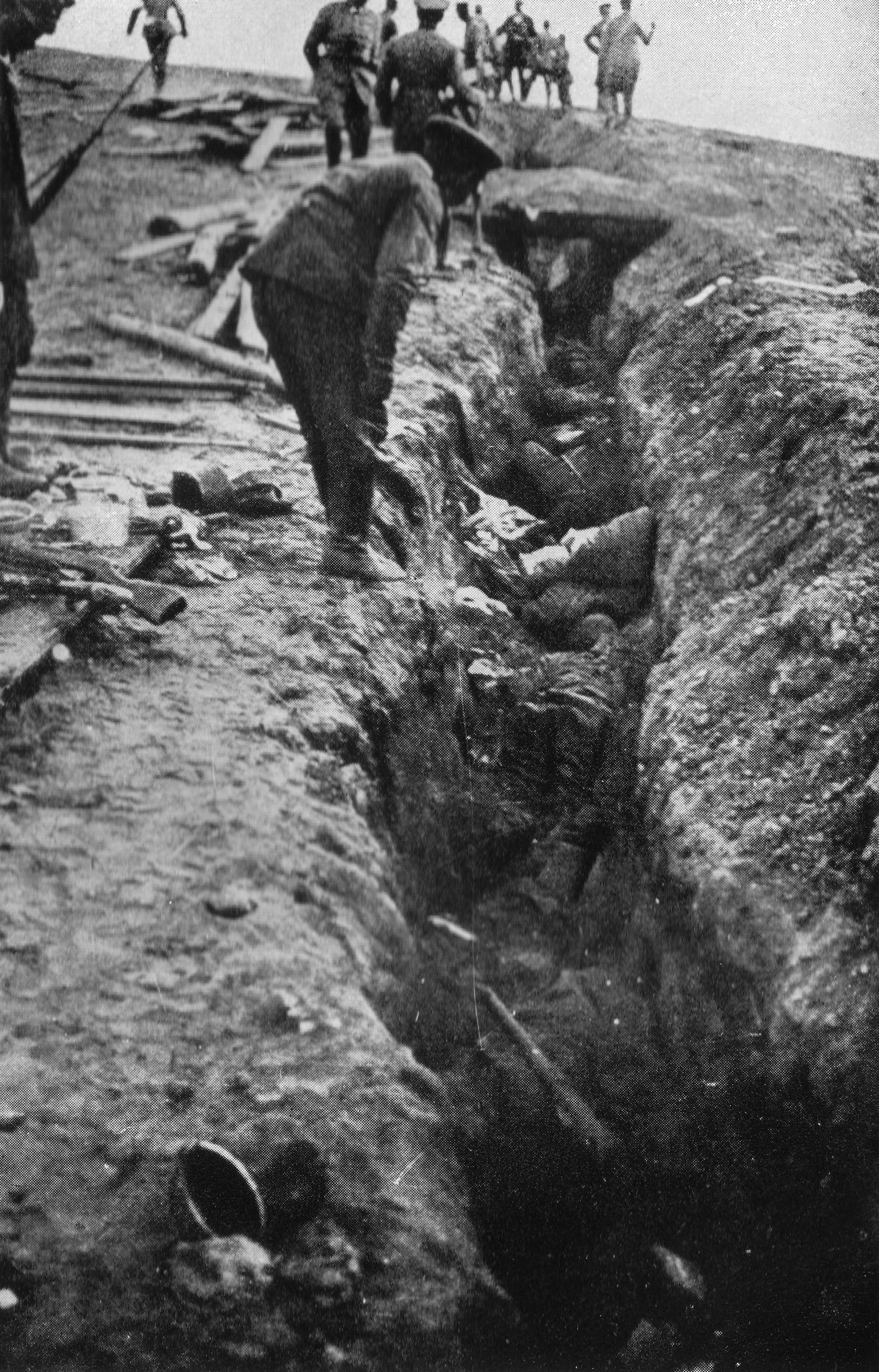 zerschossener Graben bei Usdau 1914